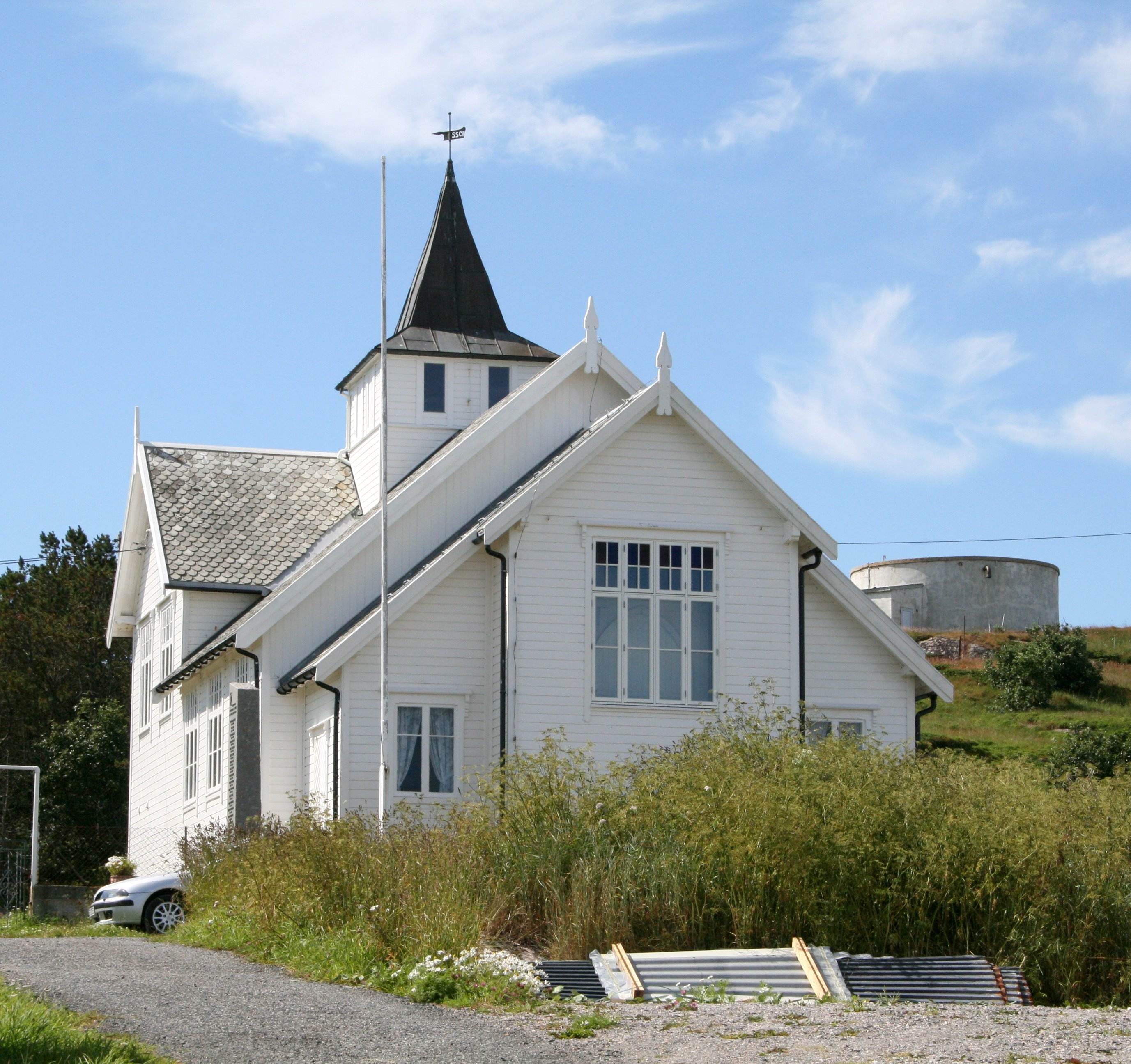 Norsk (bokmål): Sula kapell, Frøya